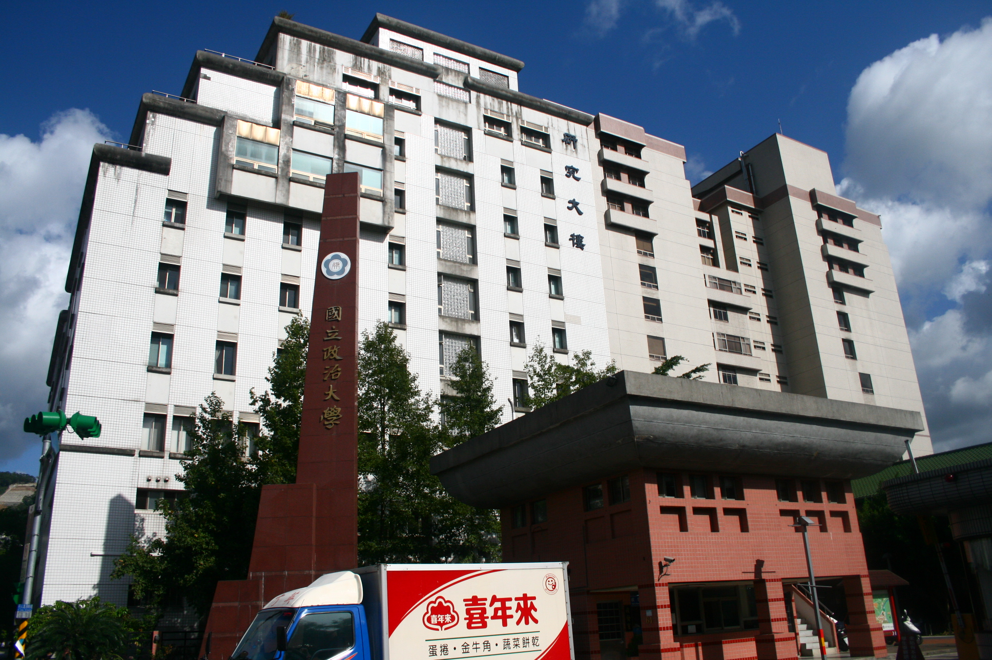 中文（台灣）: 臺北市文山區國立政治大學正門。